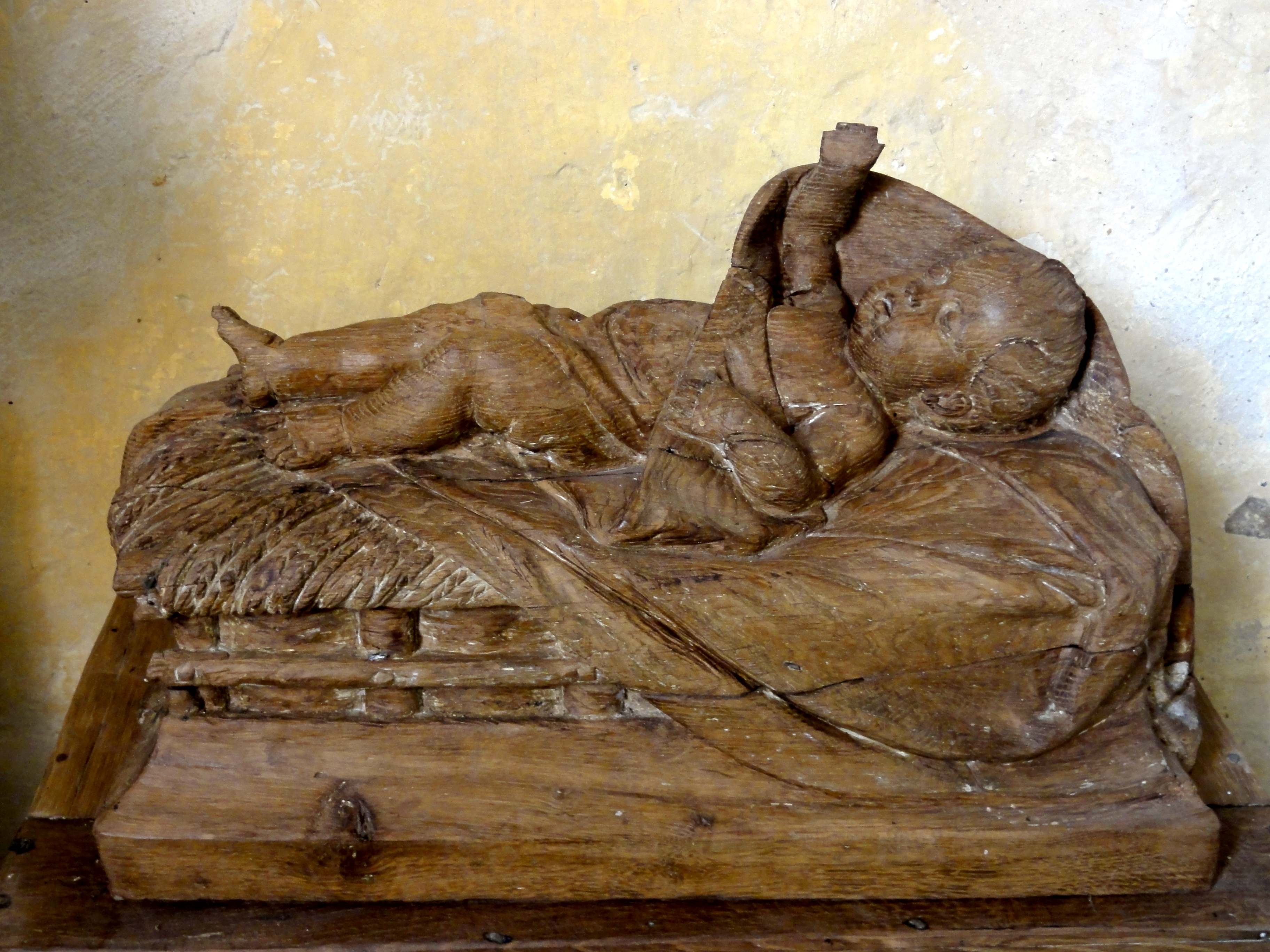 Mobilier de l'église - voir titre.